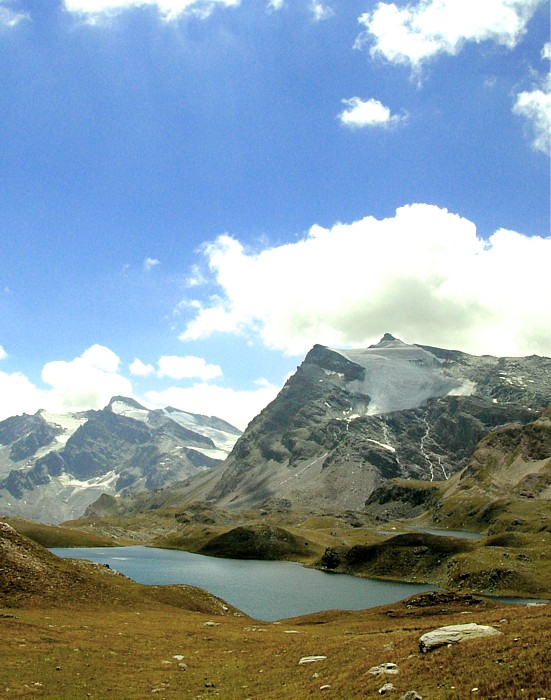 Col di Nivolet, provincia di Torino